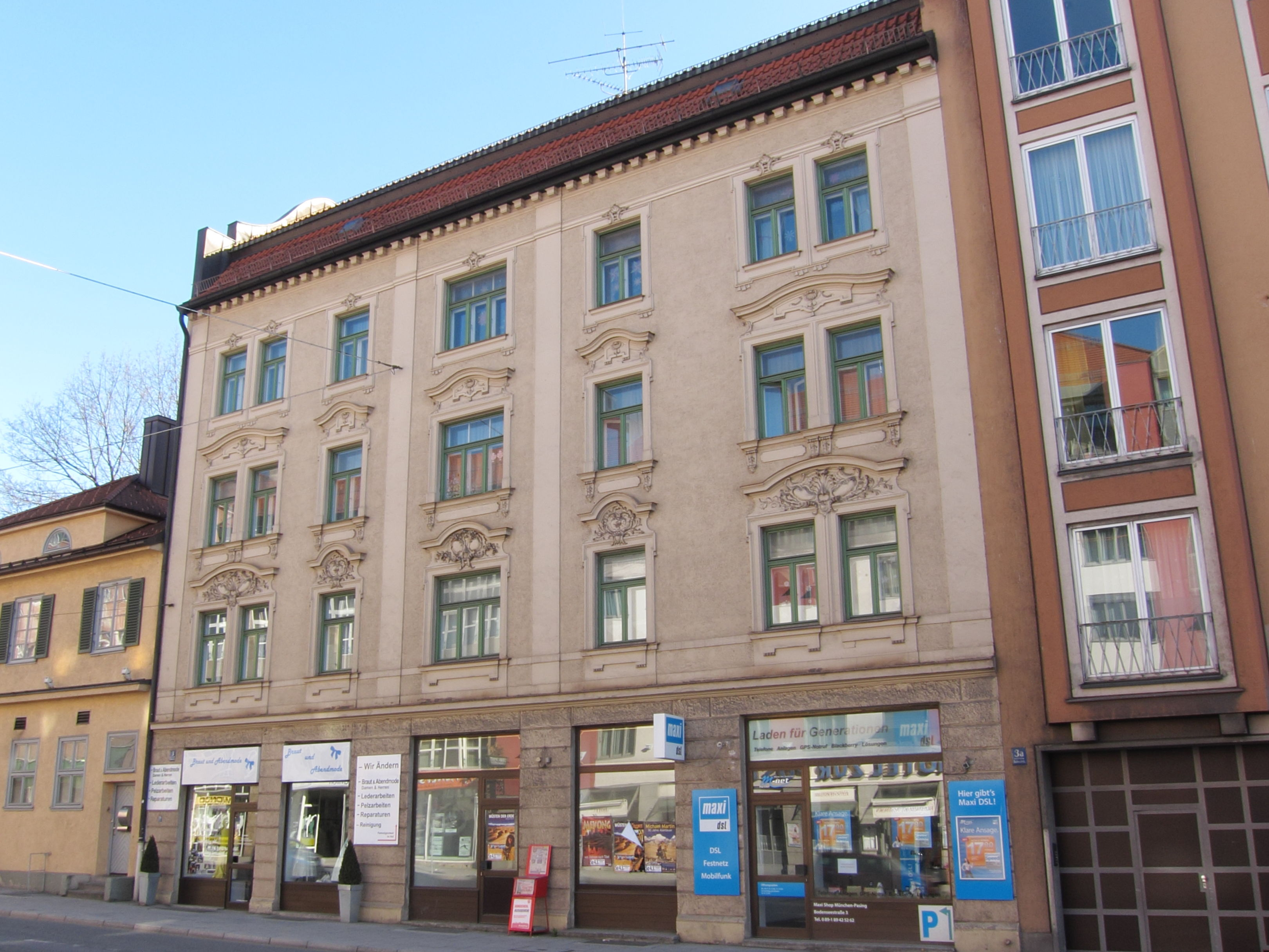 Bodenseestraße 3; Wohn- und Geschäftshaus, Neurokokodekor, viergeschossig, um 1900.